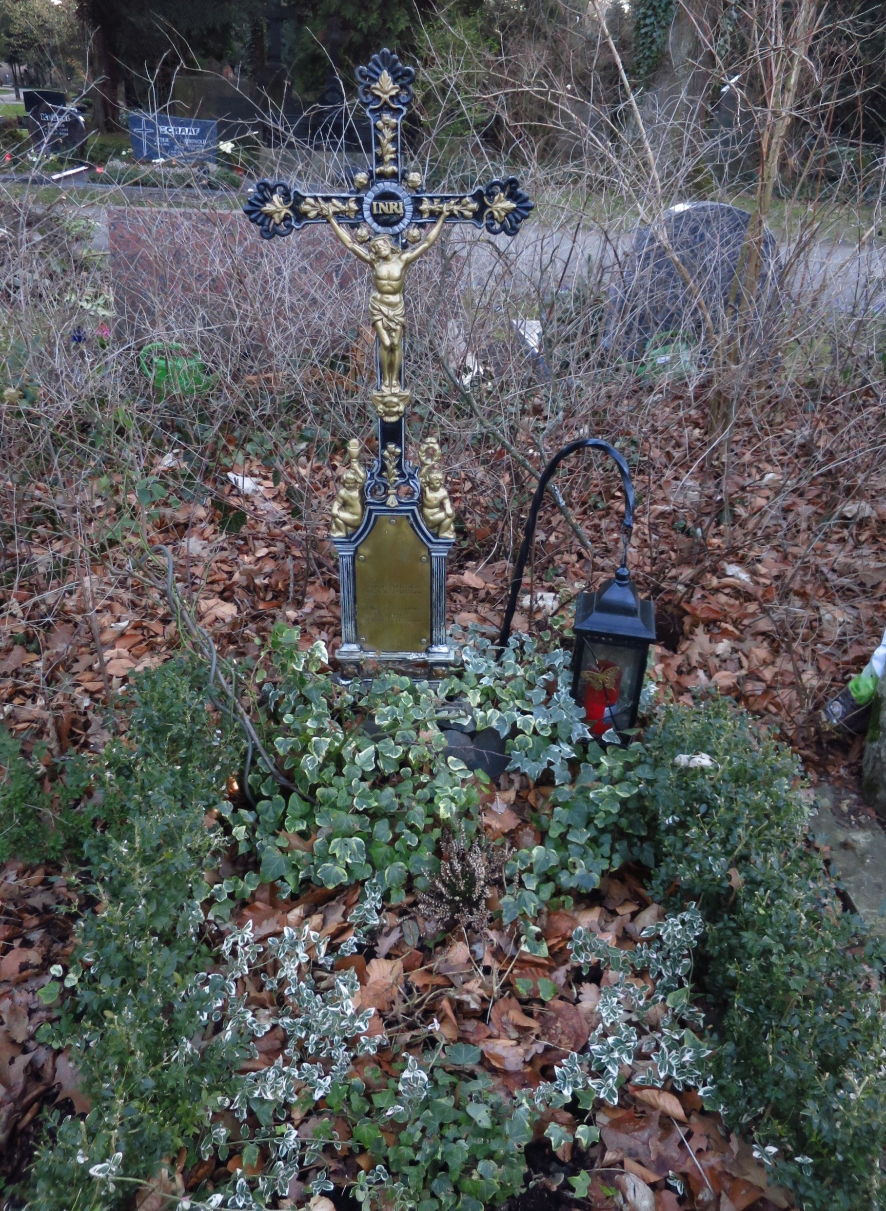 Antonius Höckelmann - Grab auf dem Kölner Nordfriedhof